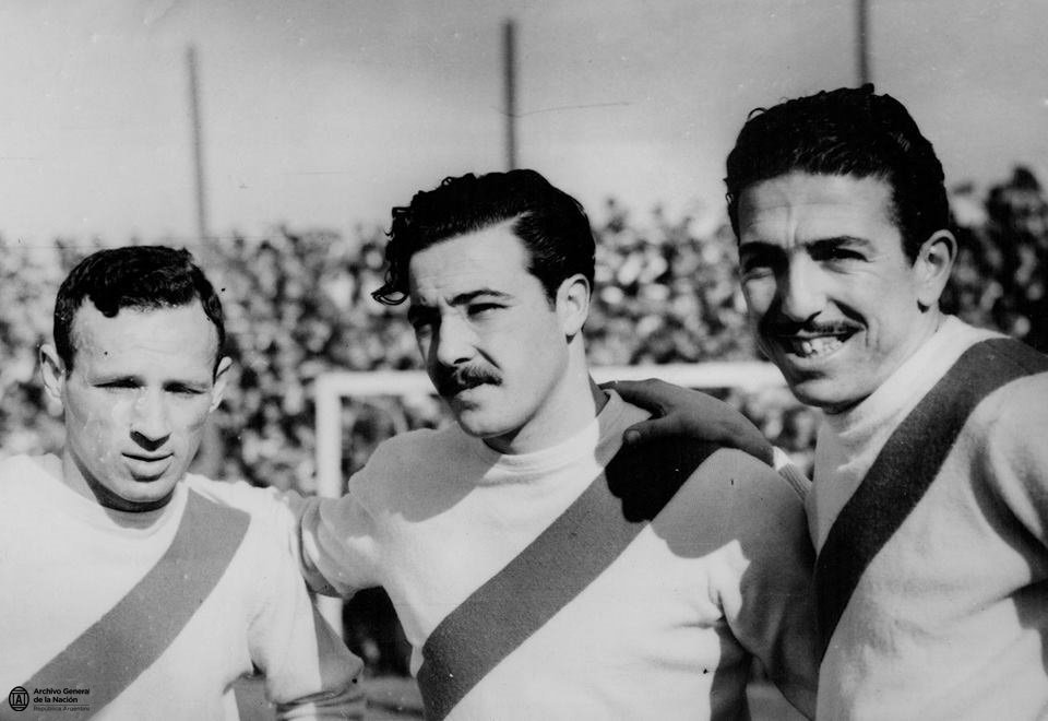 Delantera de River Plate con Felix Lousteau, Walter Gómez y Angel Labruna 1952. AGN_DDF/ Inv: 349929.